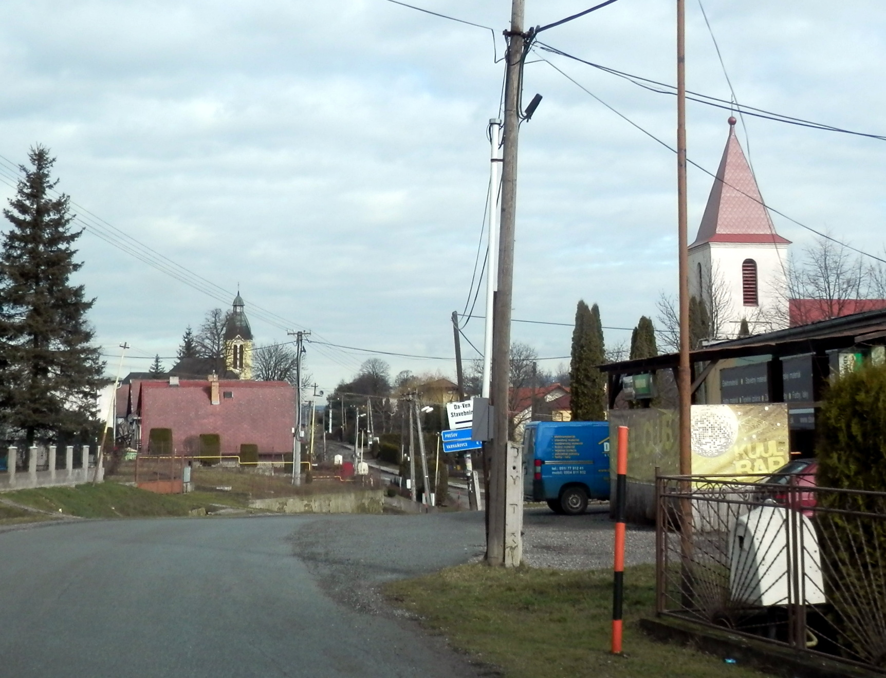 Obec Šarišské Bohdanovce, okres Prešov